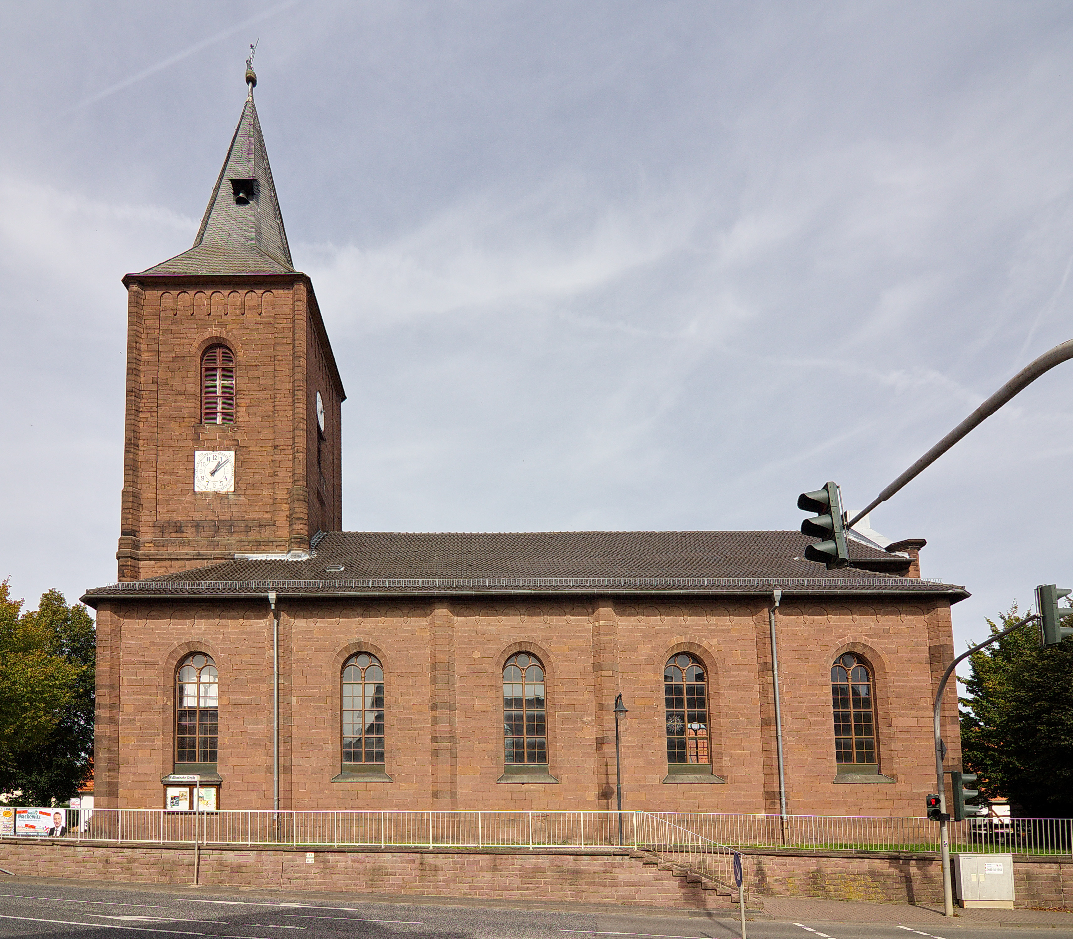 Johannes Kirche in Calden (LK Kassel), Hessen, Deutschland